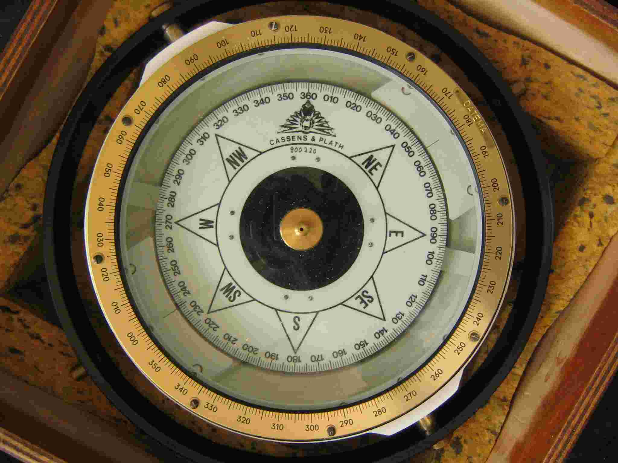 compas magnétique de secours marine